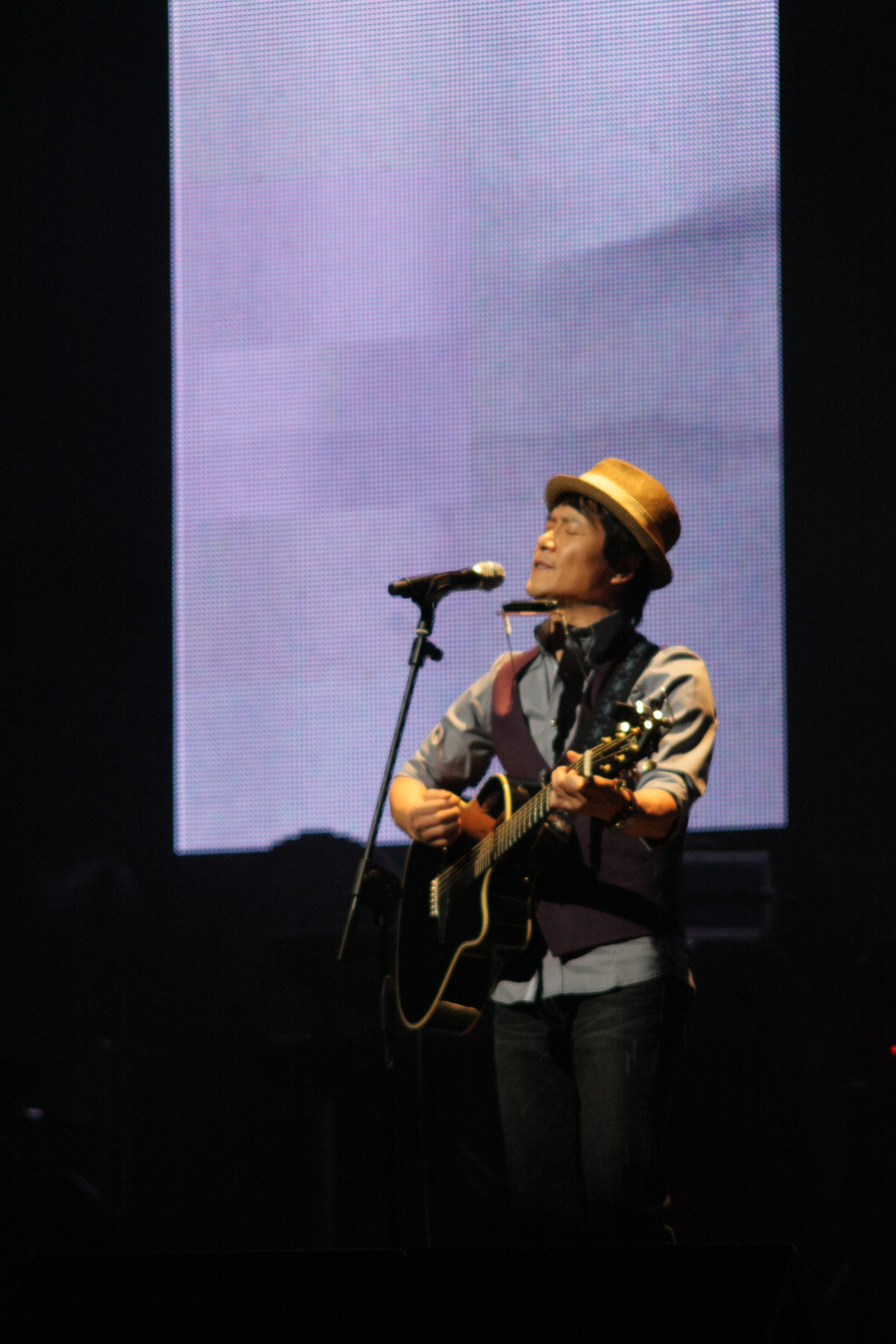 안치환(세종문화회관, 2010-12-5)